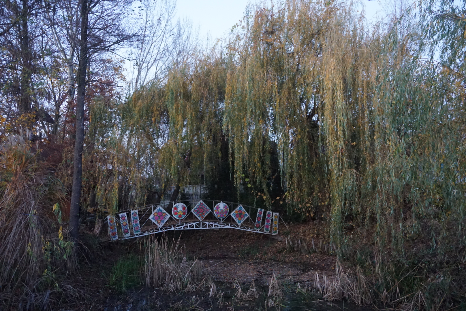 Zalipie - le vieux pont - peintures sur bois